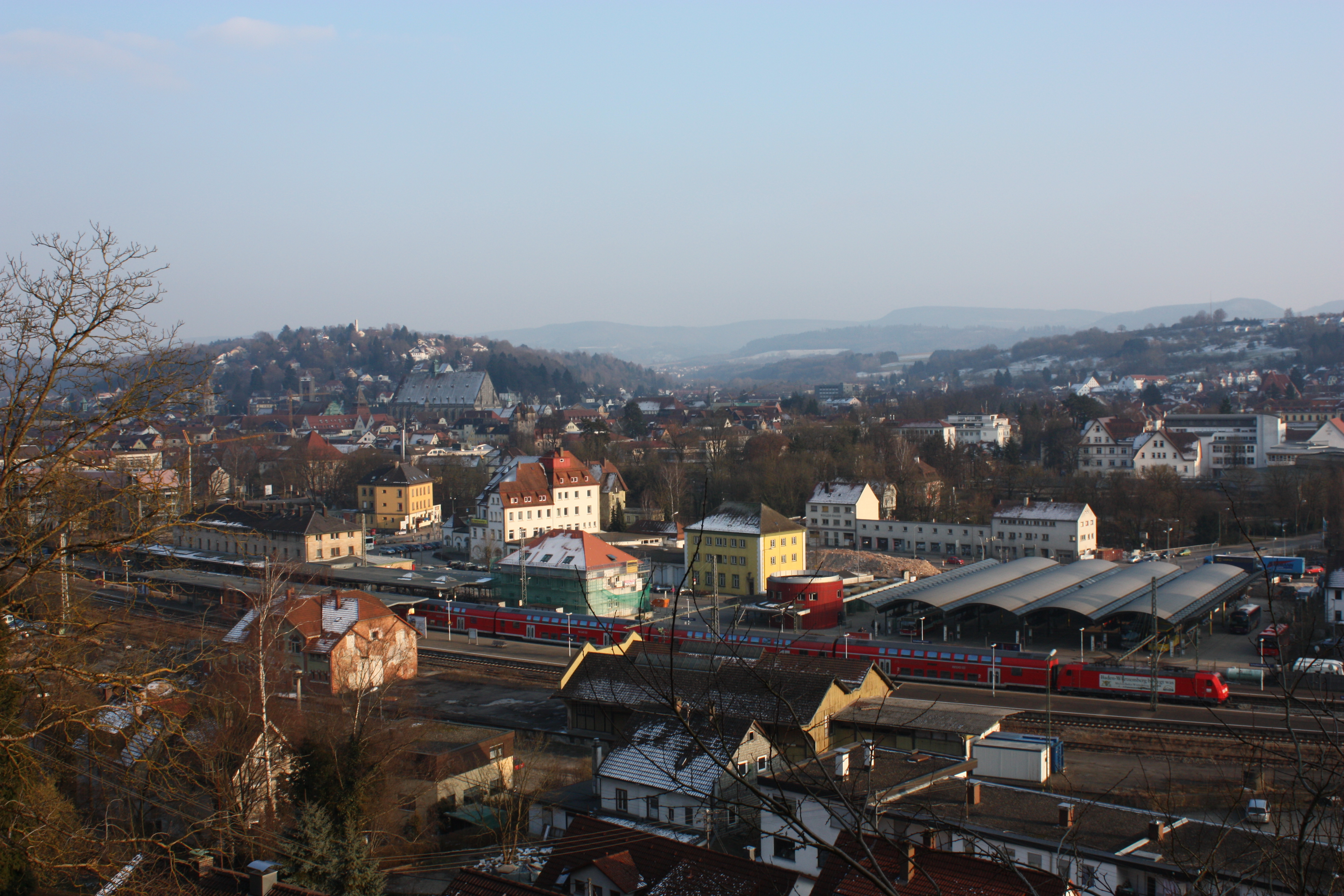 Bahnhof Schwäbisch Gmünd von St. Salvator